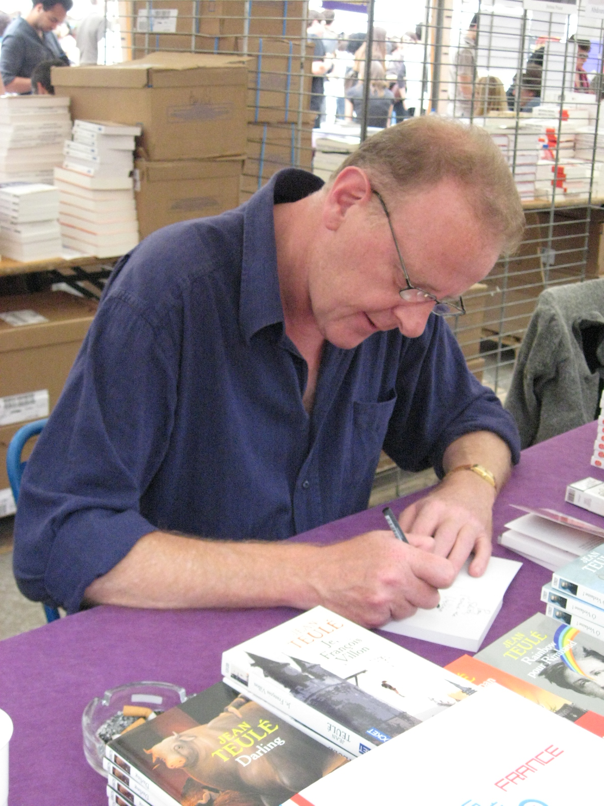 Jean Teulé, à la Comédie du livre de Montpellier, 23 mai 2009